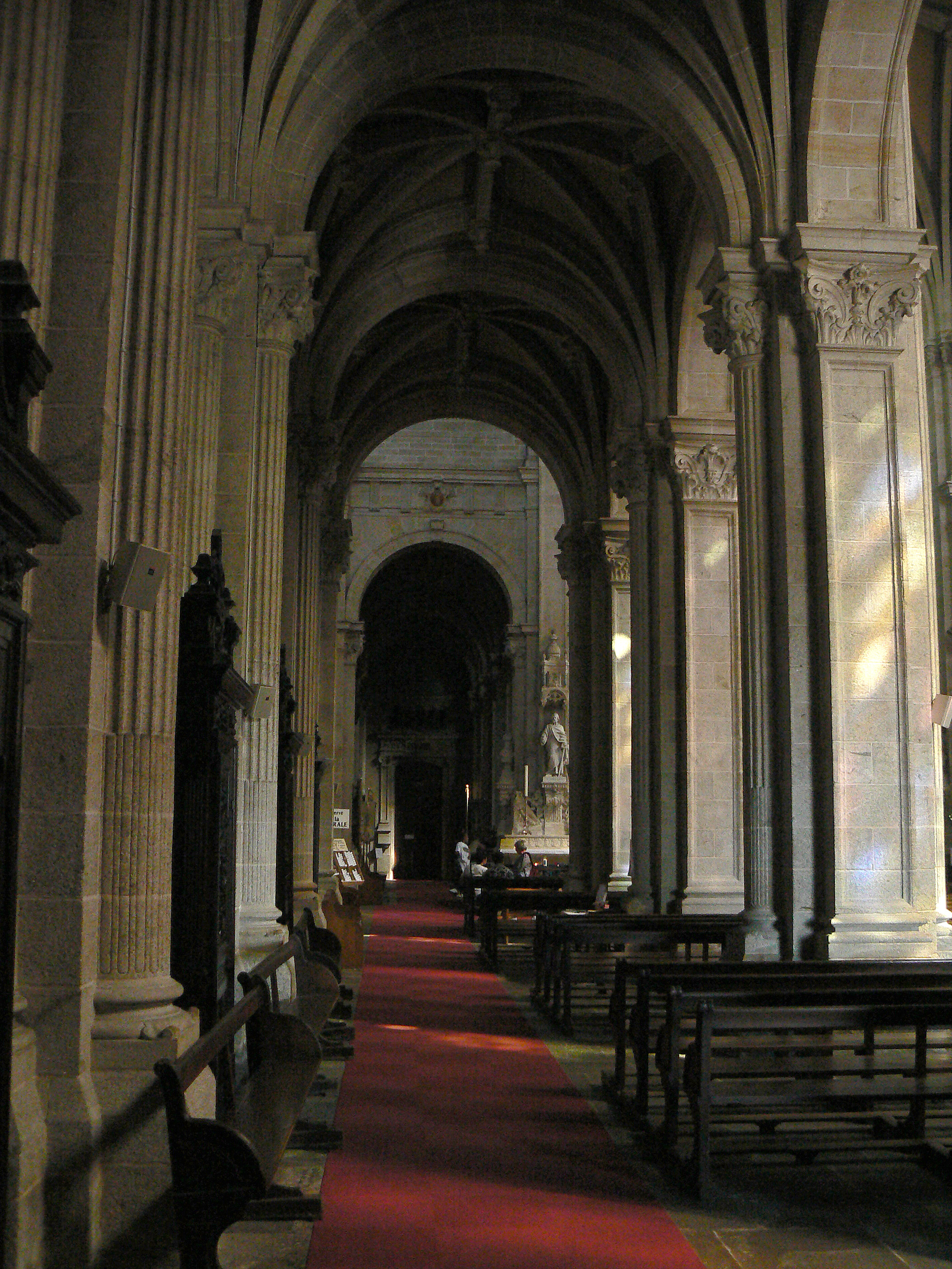 Collatéral nord de la nef de la Basilique Sainte-Anne d'Auray (56).